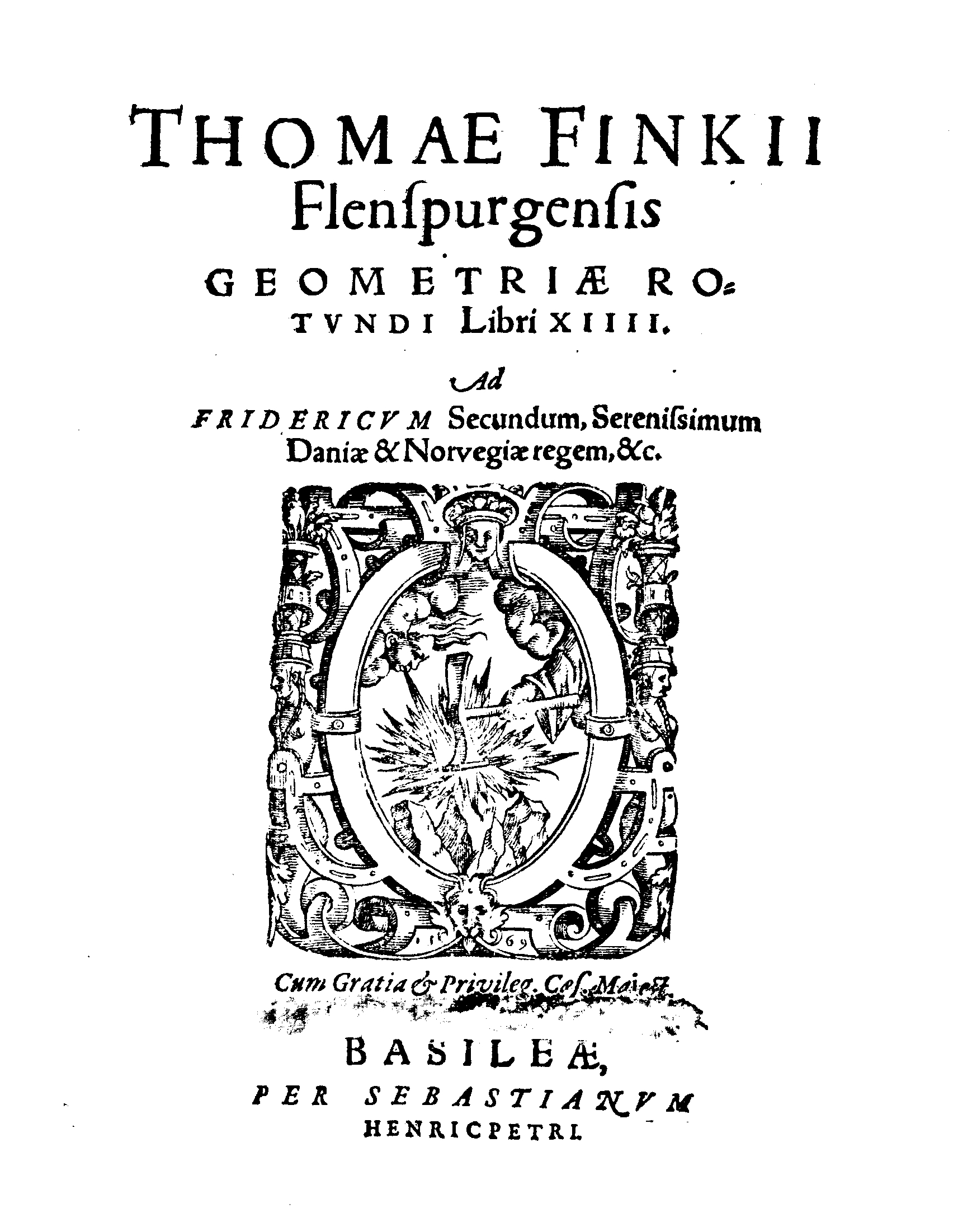 Thomae Finkii Flenspurgensis Geometriae rotundi libri 14. - Basileae : per Sebastianum Henricpetri, 1583 (Basileae : per Sebastianum Henricpetri, 1583 mense augusto). - [16], 406, [2] p. : ill. ; 4º .